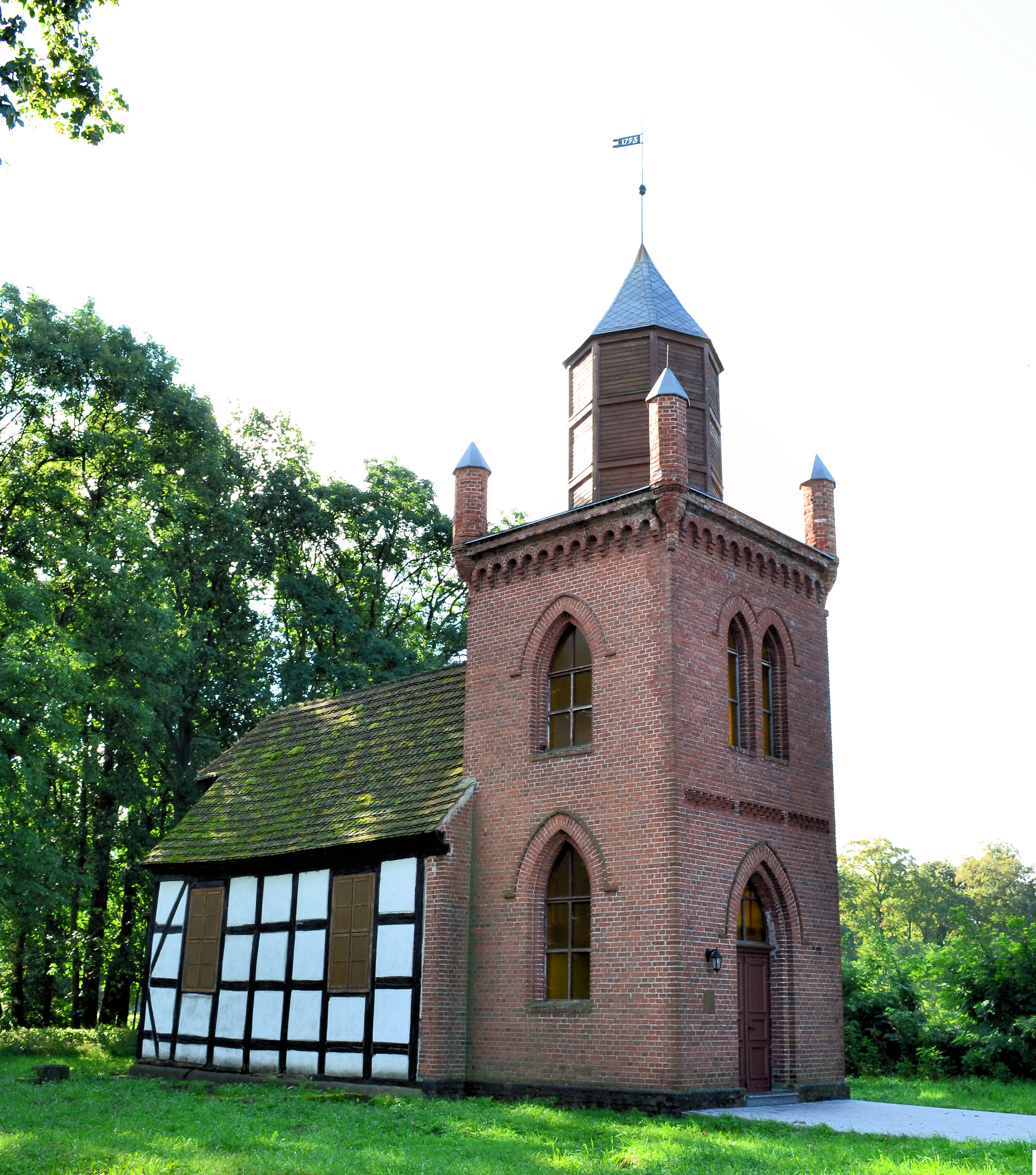 Kościół św. Huberta w Nowym Warpnie Karsznie